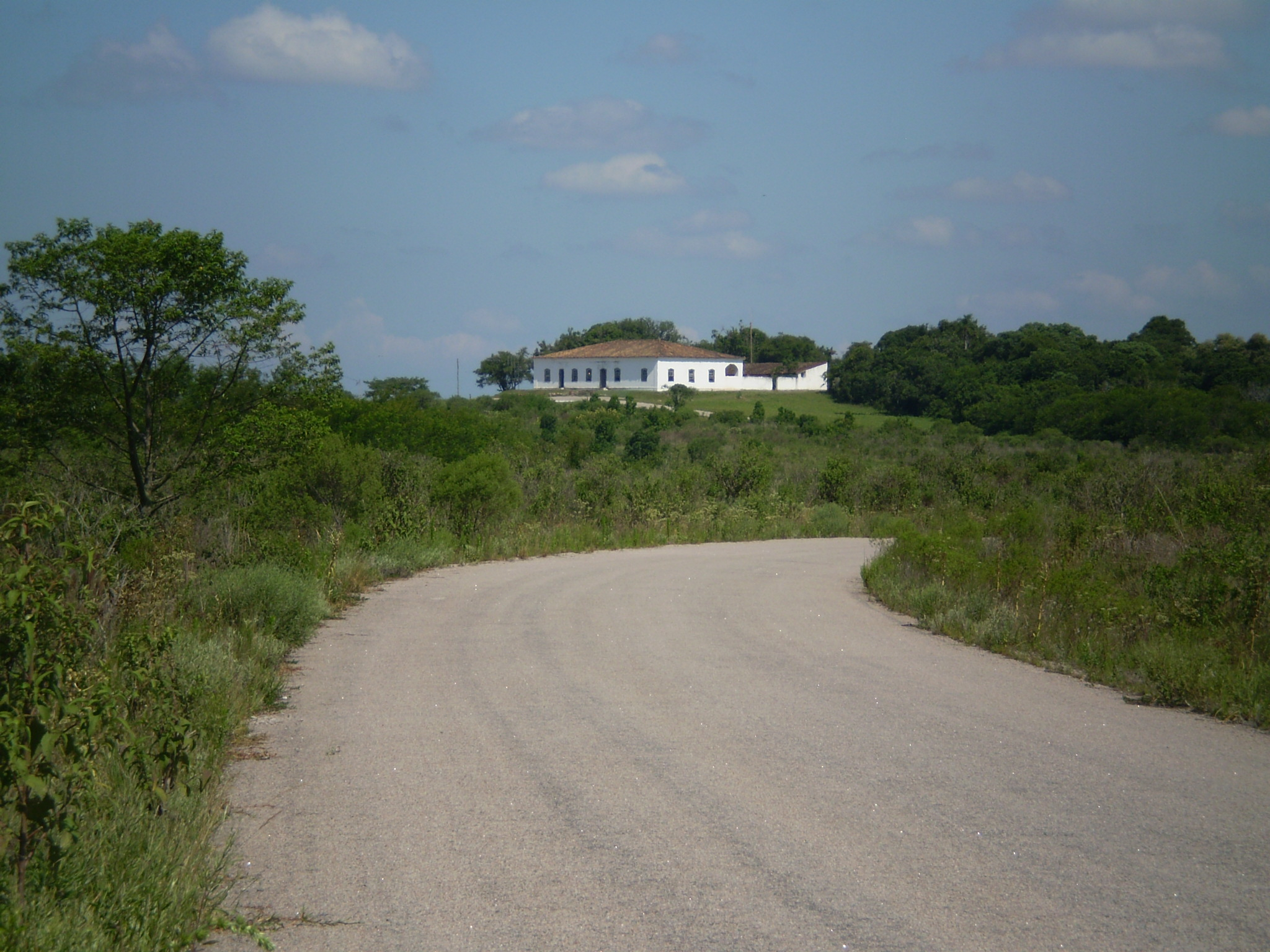 House of Bento Gonçalves in Cristal, Rio Grande do Sul, Brazil.